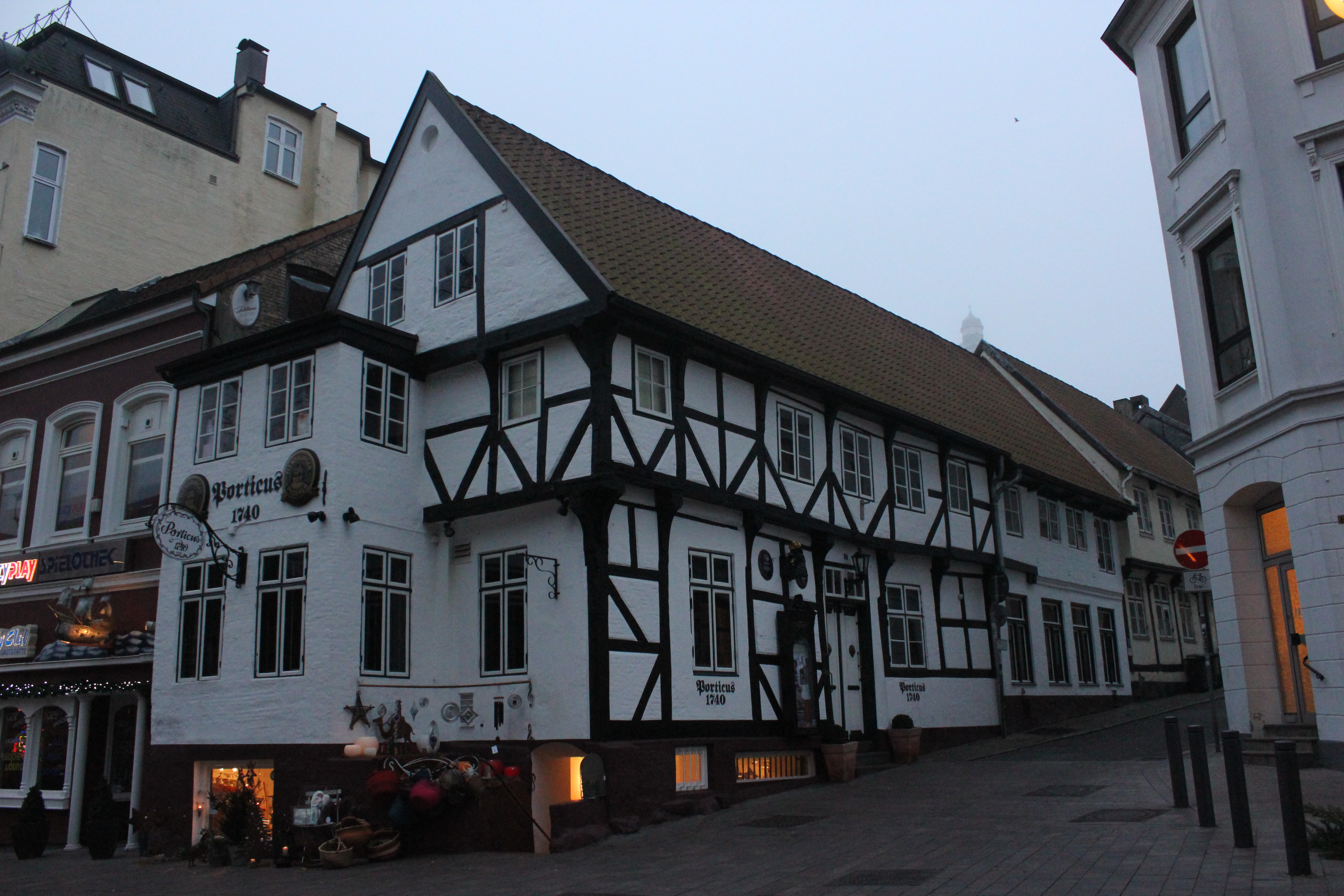 Porticus (Flensburg) - Marienstraße 1